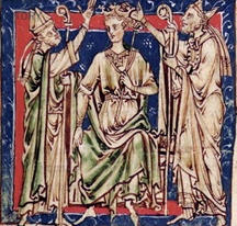 Korunovace Viléma II. Anglického